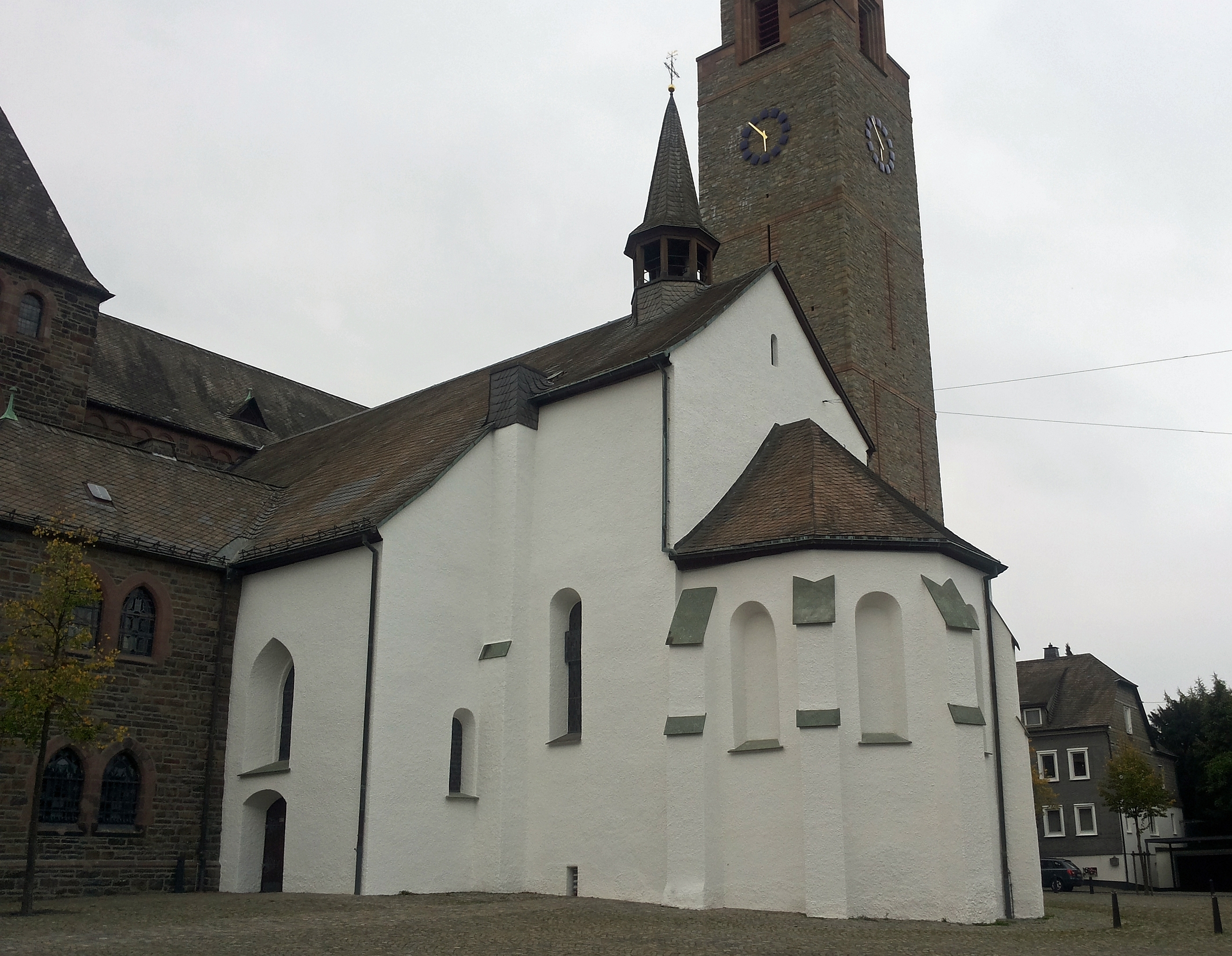 Renovierter älteren Teil der Kirche St.-Alexander in Schmallenberg